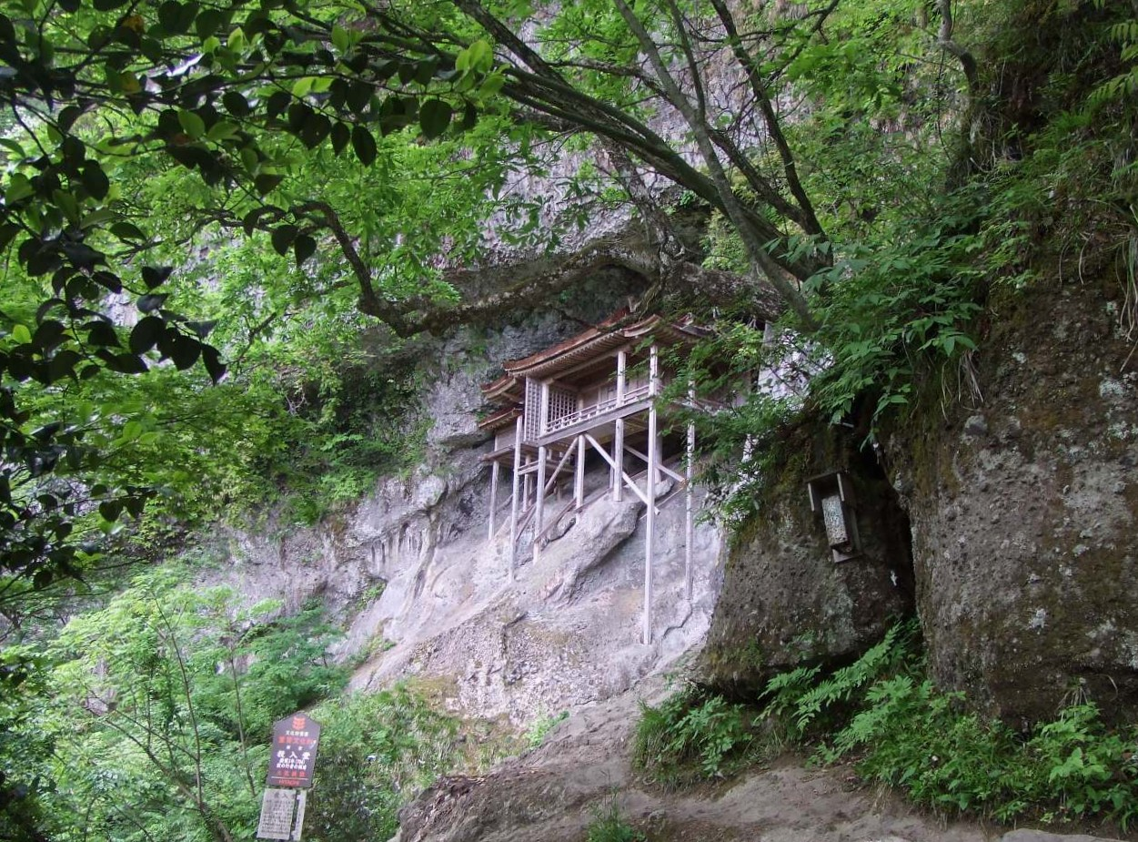 三徳山の最高地点